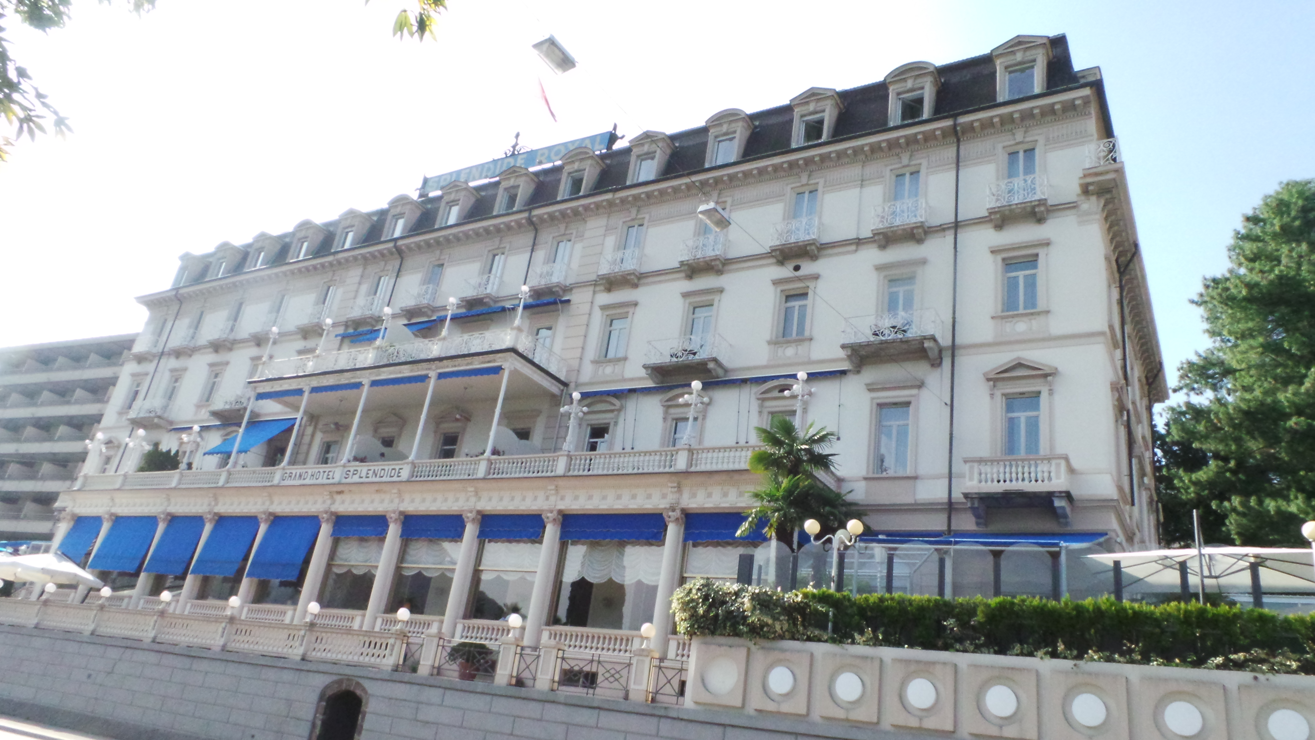 Hotel Splendide Royale, Lugano